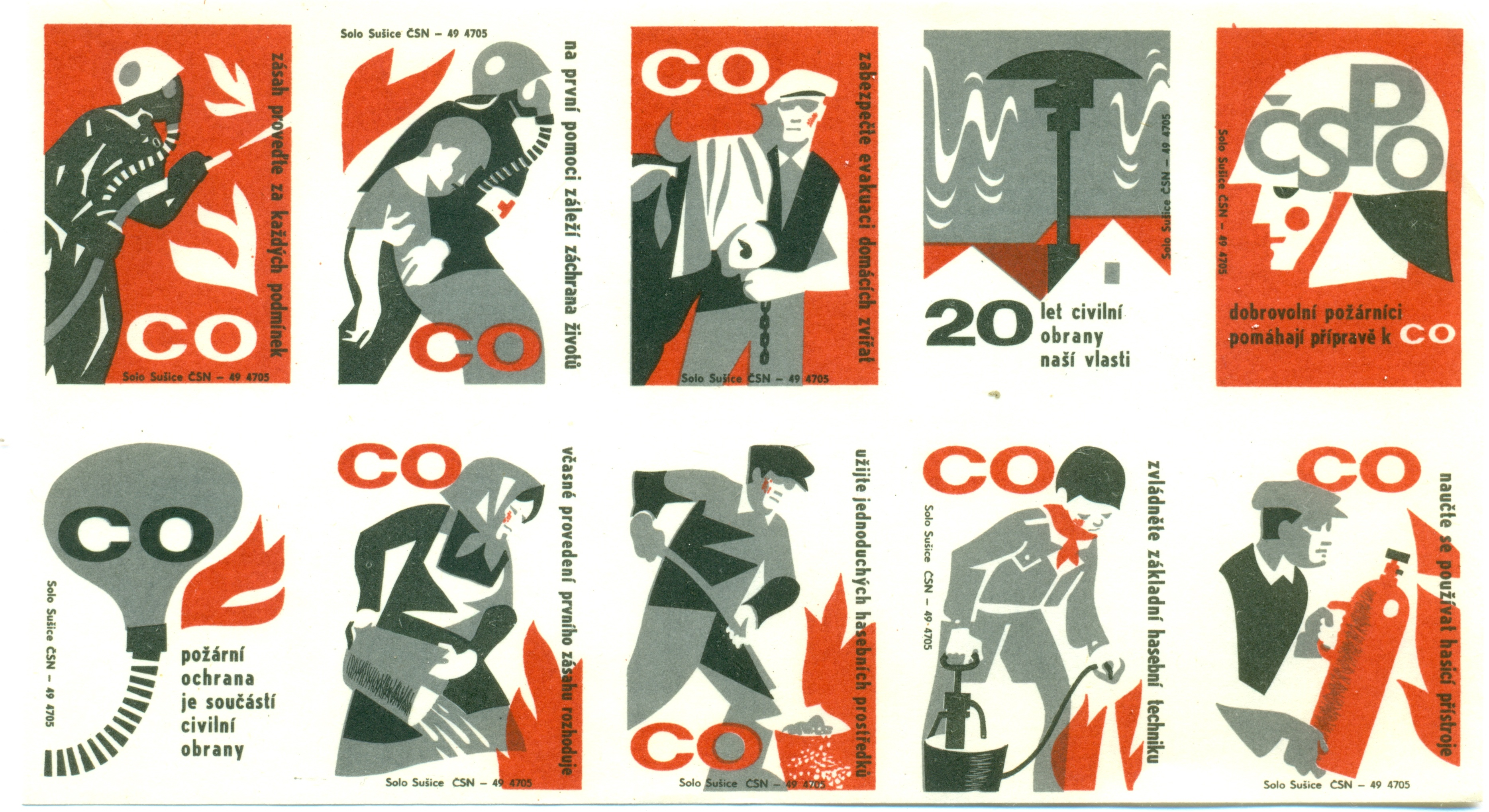 nálepky z roku 1971